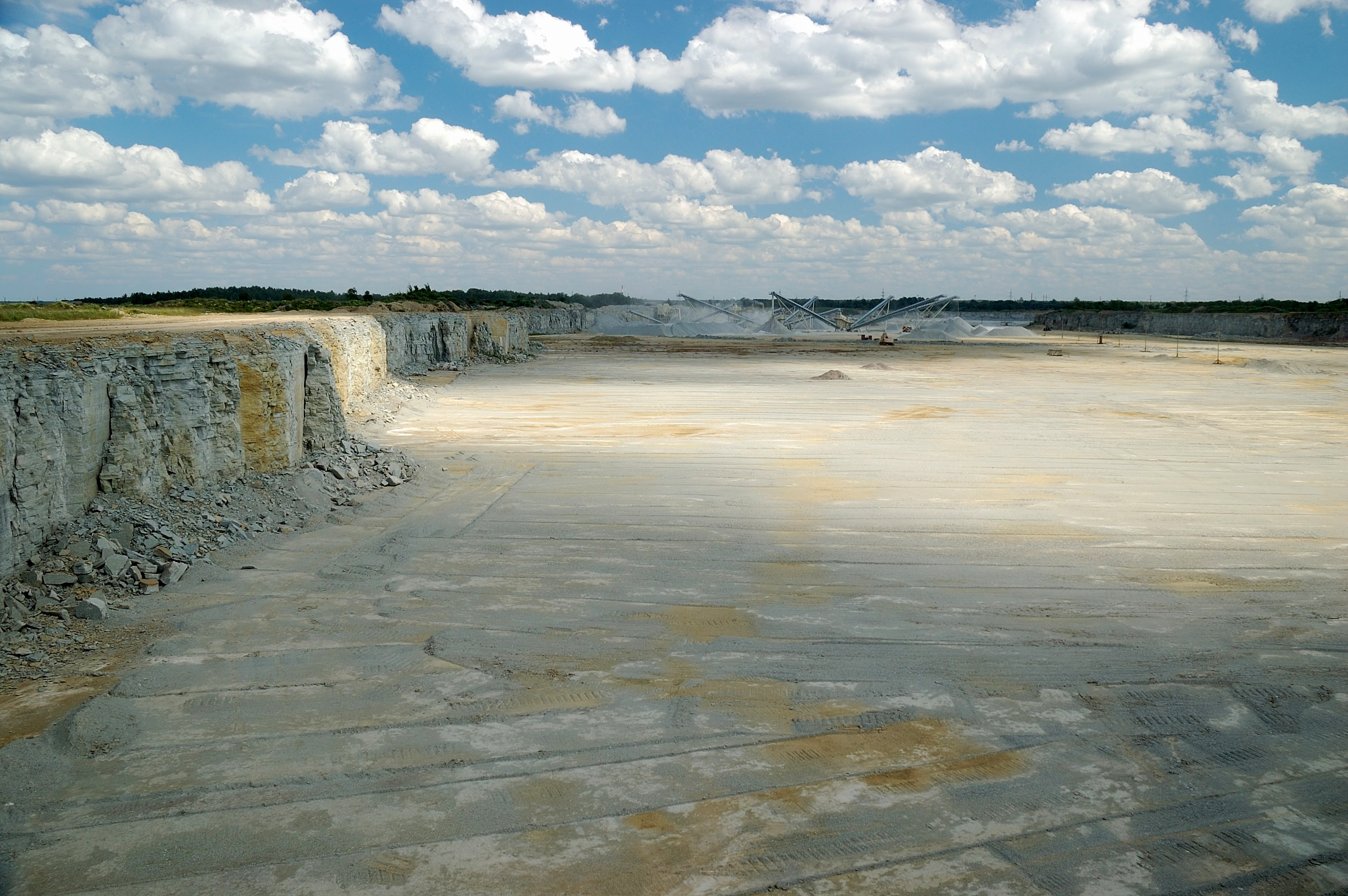 Harku karjäär, Hüüru